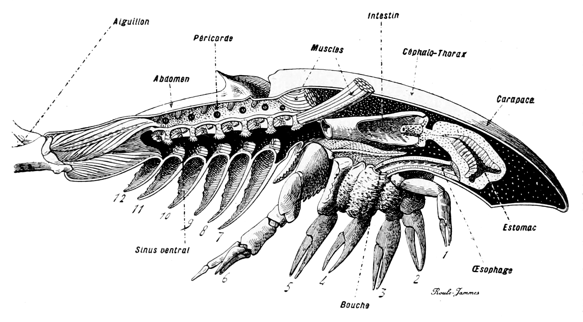 Coupe médiane, longitudinale et verticale du corps entier, sauf l'aiguillon : les appendices sont désignés par leurs numéros d'ordre. La part antérieure du tube digestif est seule représentée. L'expression "péricarde" s'applique à l'emplacement de cette cavité, où s'ouvrent les orifices des vaisseaux branchio-cardiaques.